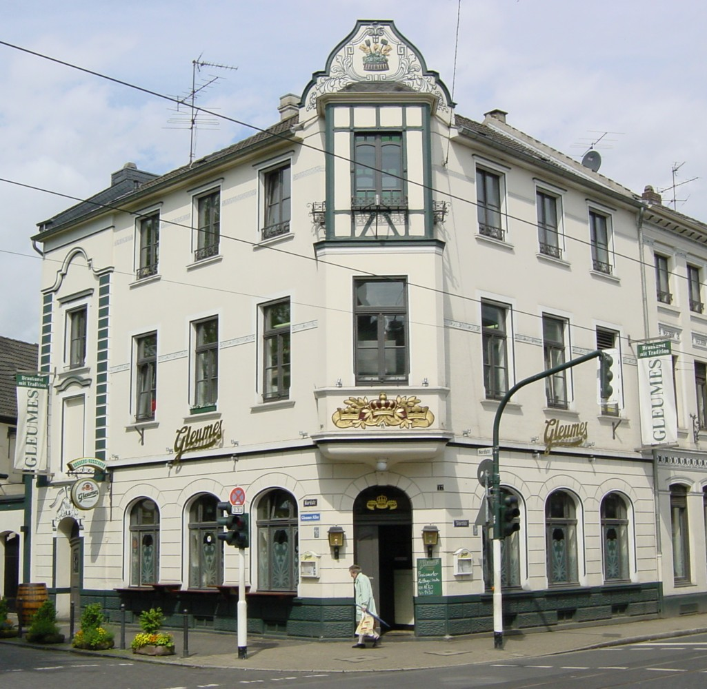 Description: Brauerei Gleumes, Krefeld Date: 22.5.2006 Author: DER UNFASSBARE